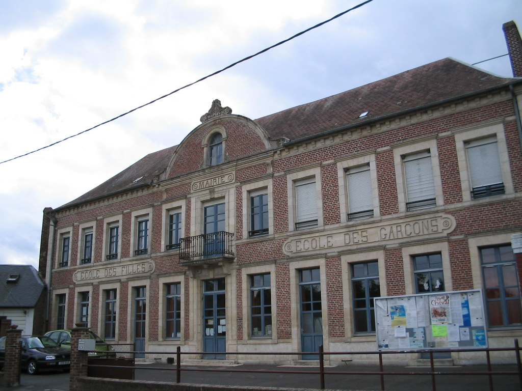 École et mairie de Voyennes, Somme, France.